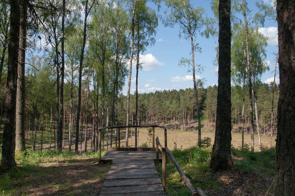 Pustlaukio duobė, esanti Kurtuvėnų regioninio parko vakarinėje dalyje